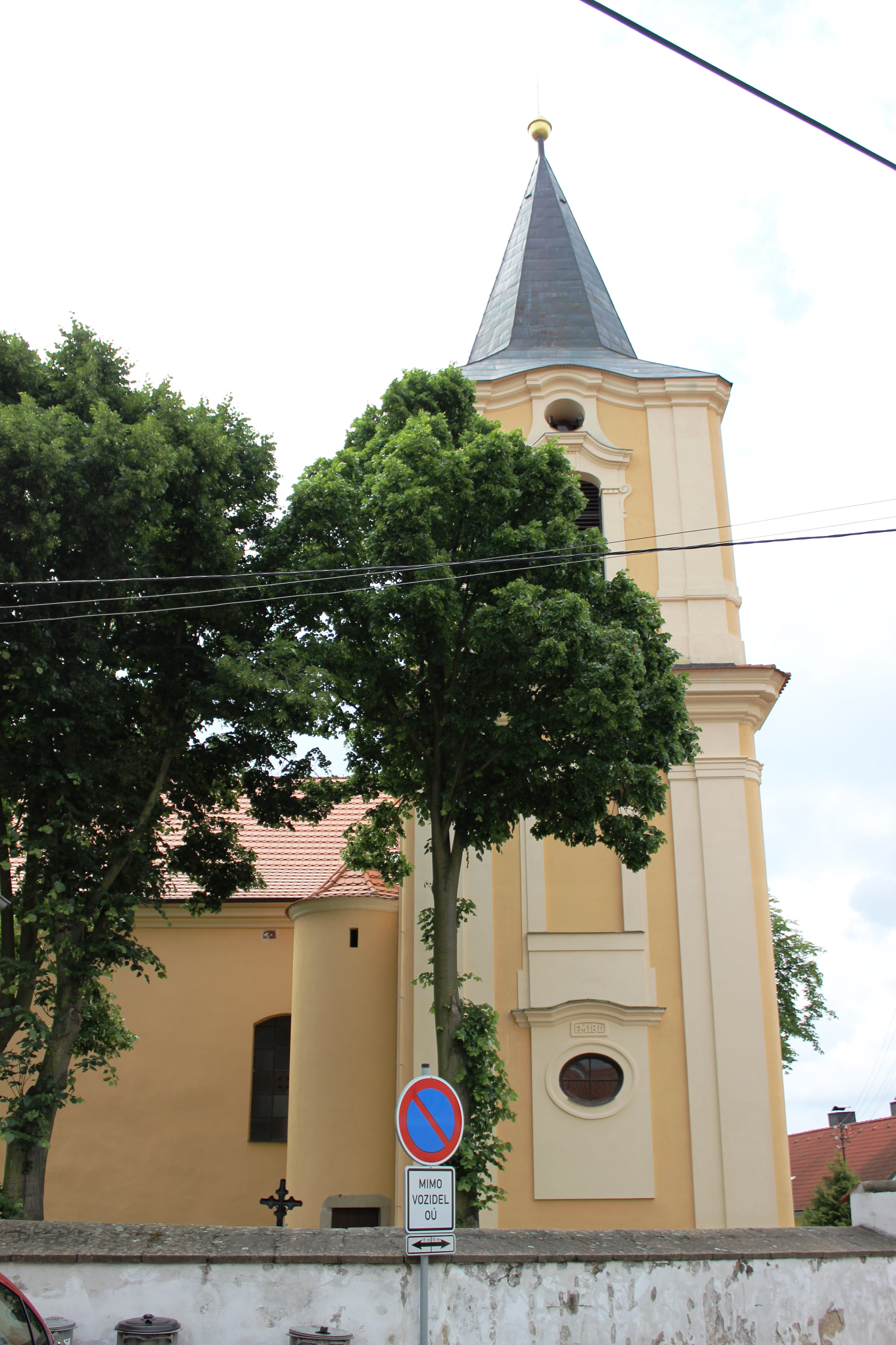 Kostel sv. Alžběty Duryňské. Svaté Pole. Okres Příbra. Česká republika.